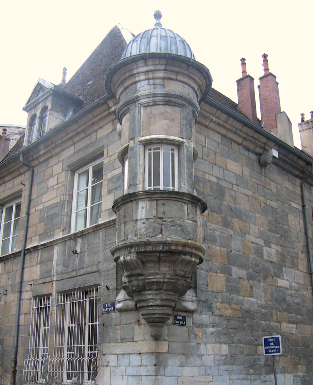 Tourelle situé sur un bâtiment de Besançon (Doubs, France), entre la rue Pasteur et la rue Zola.